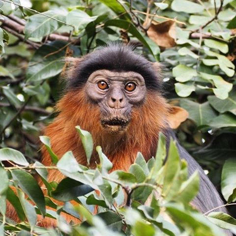 upload